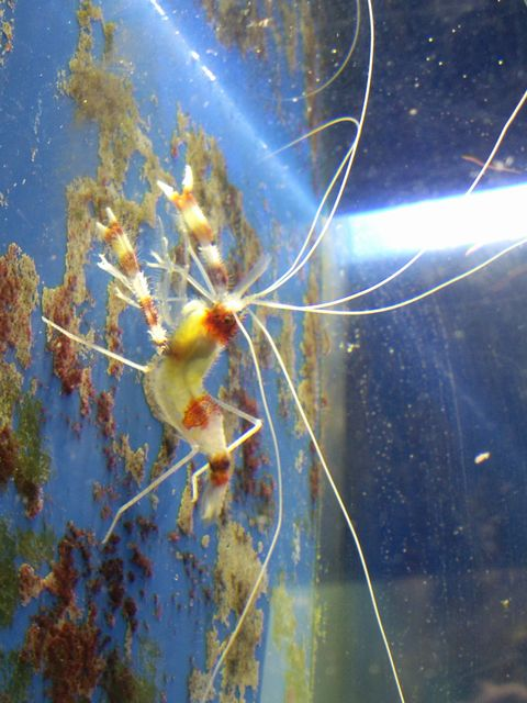 オトヒメエビ, 長崎ペンギン水族館飼育個体 (Stenopus hispidus, Nagasaki Penguin Aquarium)